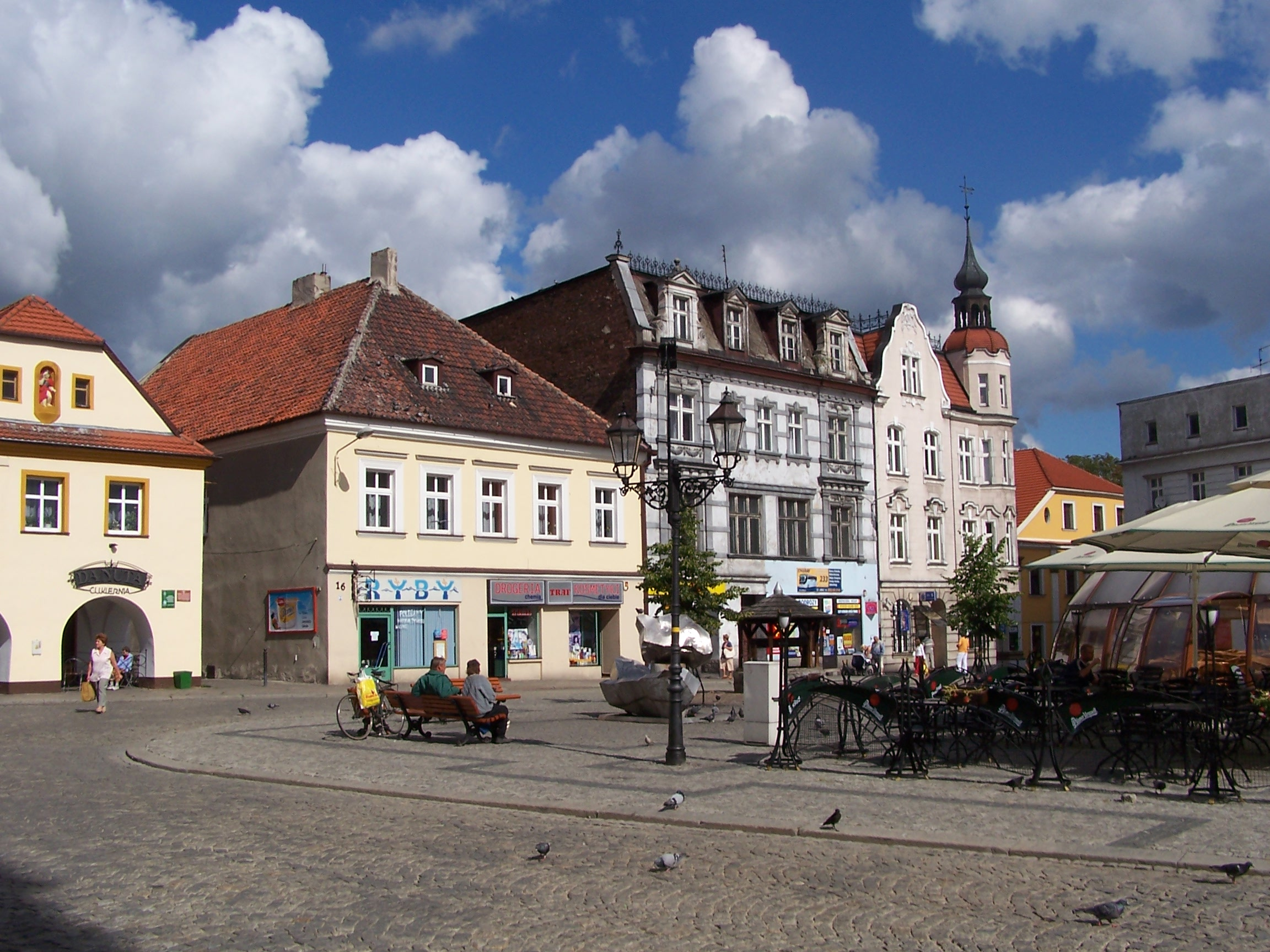 Tarnowskie Góry - Rynek